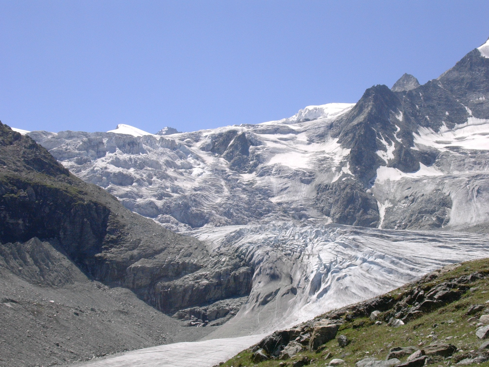 Le glacier de Moiry dans le Val d'Anniviers avec le Grand Cornier et la Dent Blanche